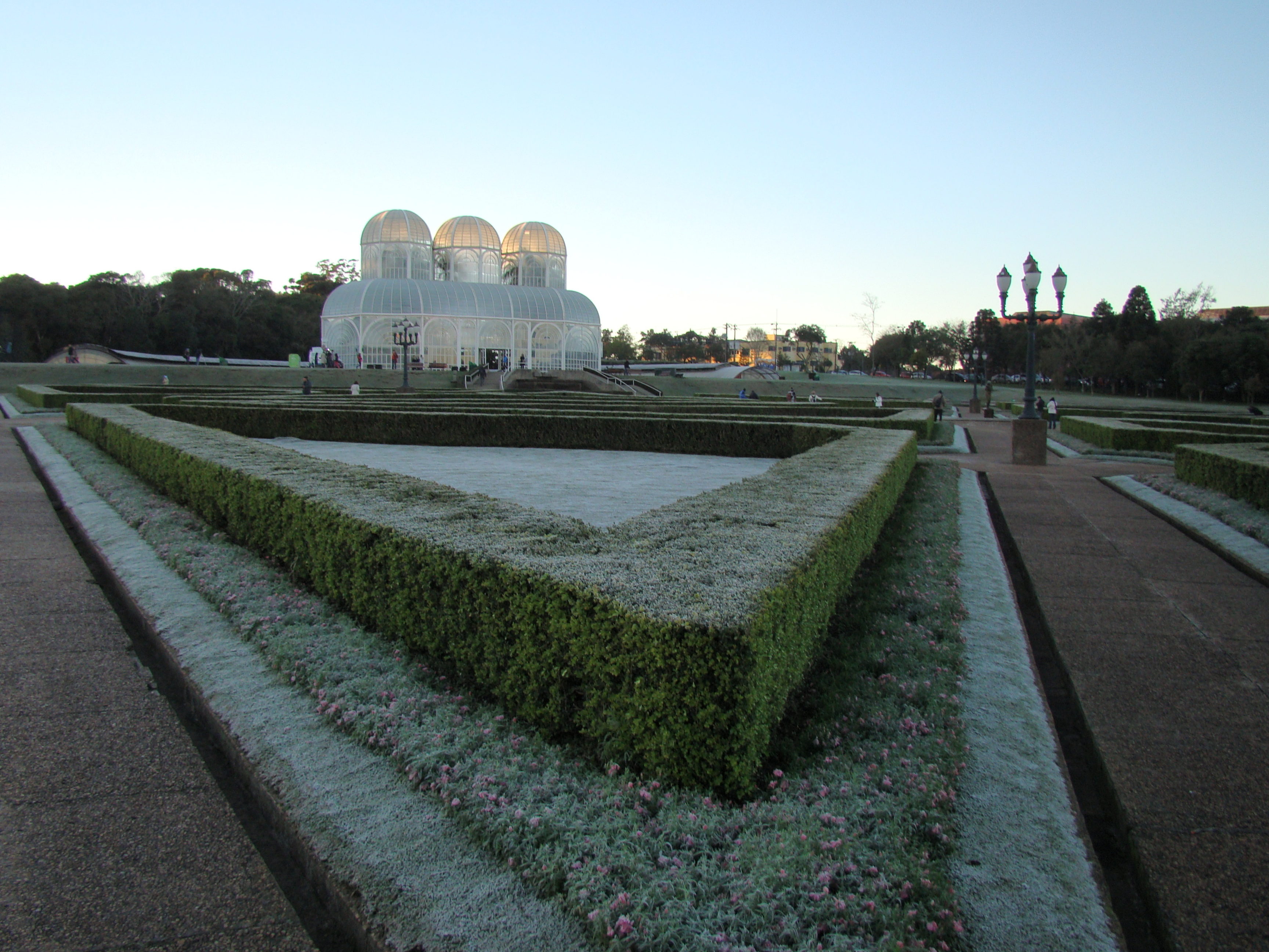 Geada cobrindo o Jardim Botânico de Curitiba, capital do Estado do Paraná, Sul do Brasil.